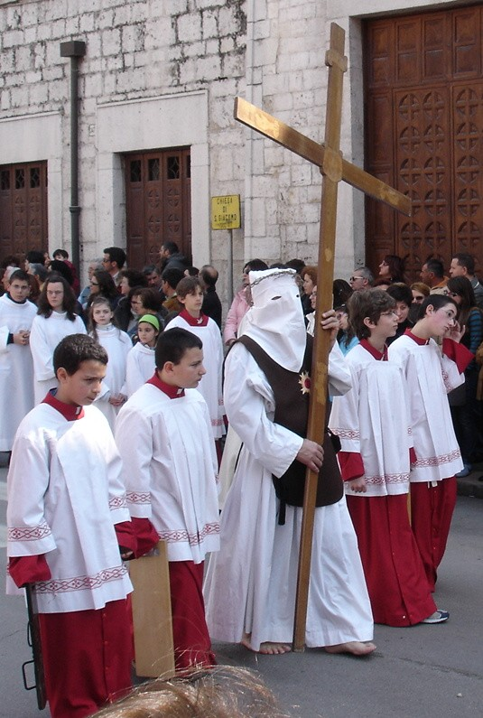 Processione di Venerdì Santo a Barletta; Good Friday parade in Barletta